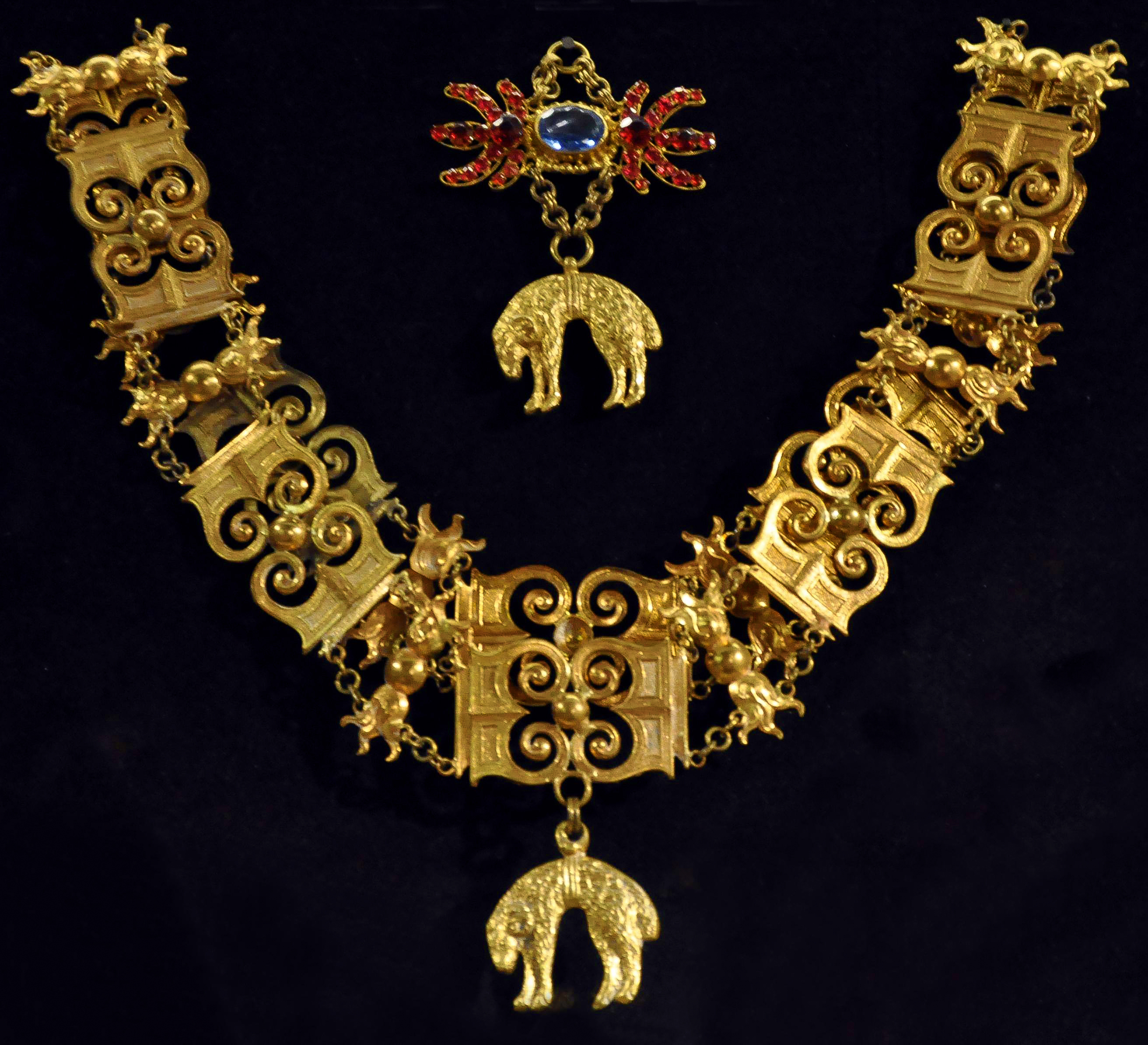 Orde van het Gulden Vlies in "Grand Curtius", museum in de Belgische stad Luik